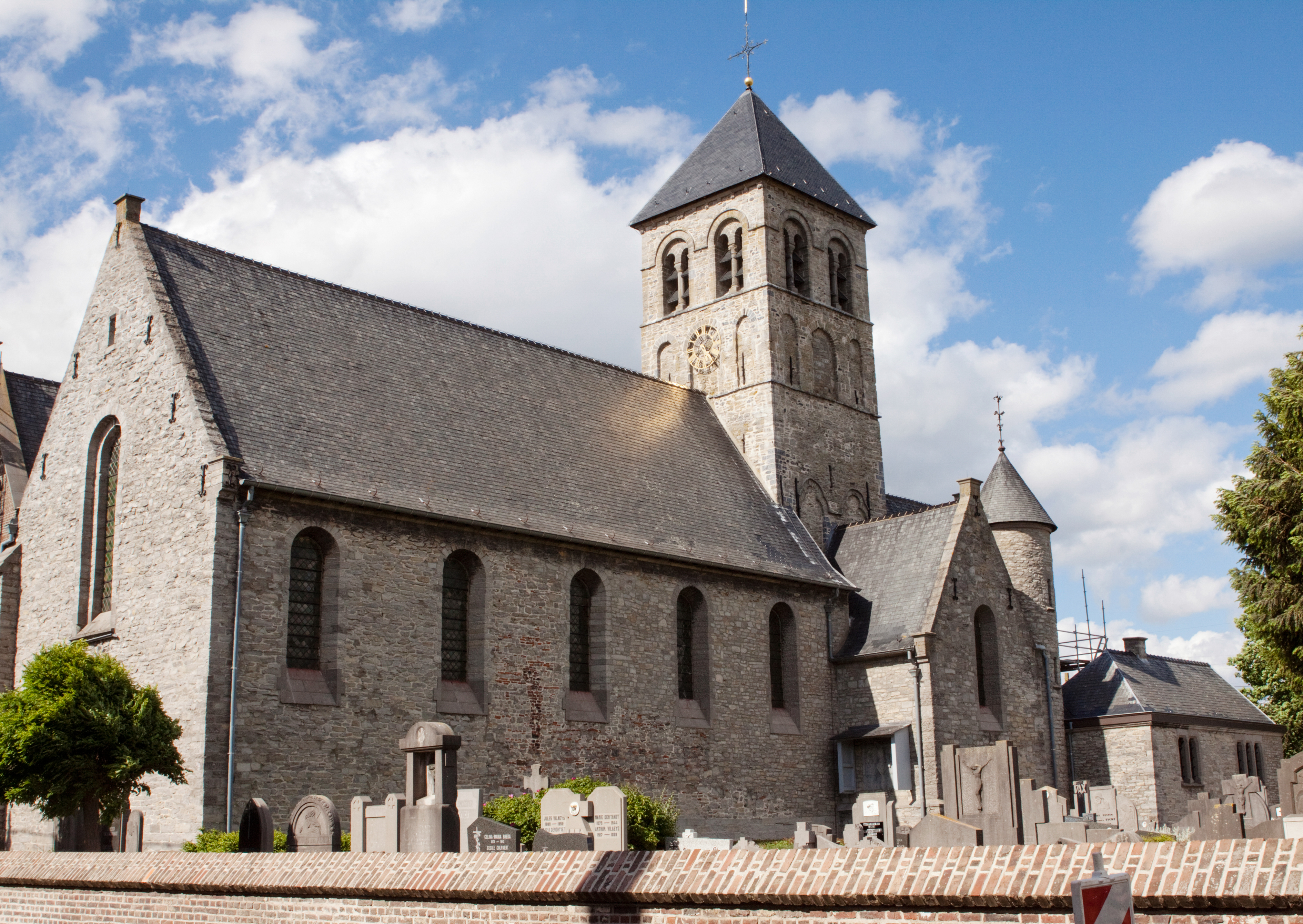 Waarmaarde Churchyard